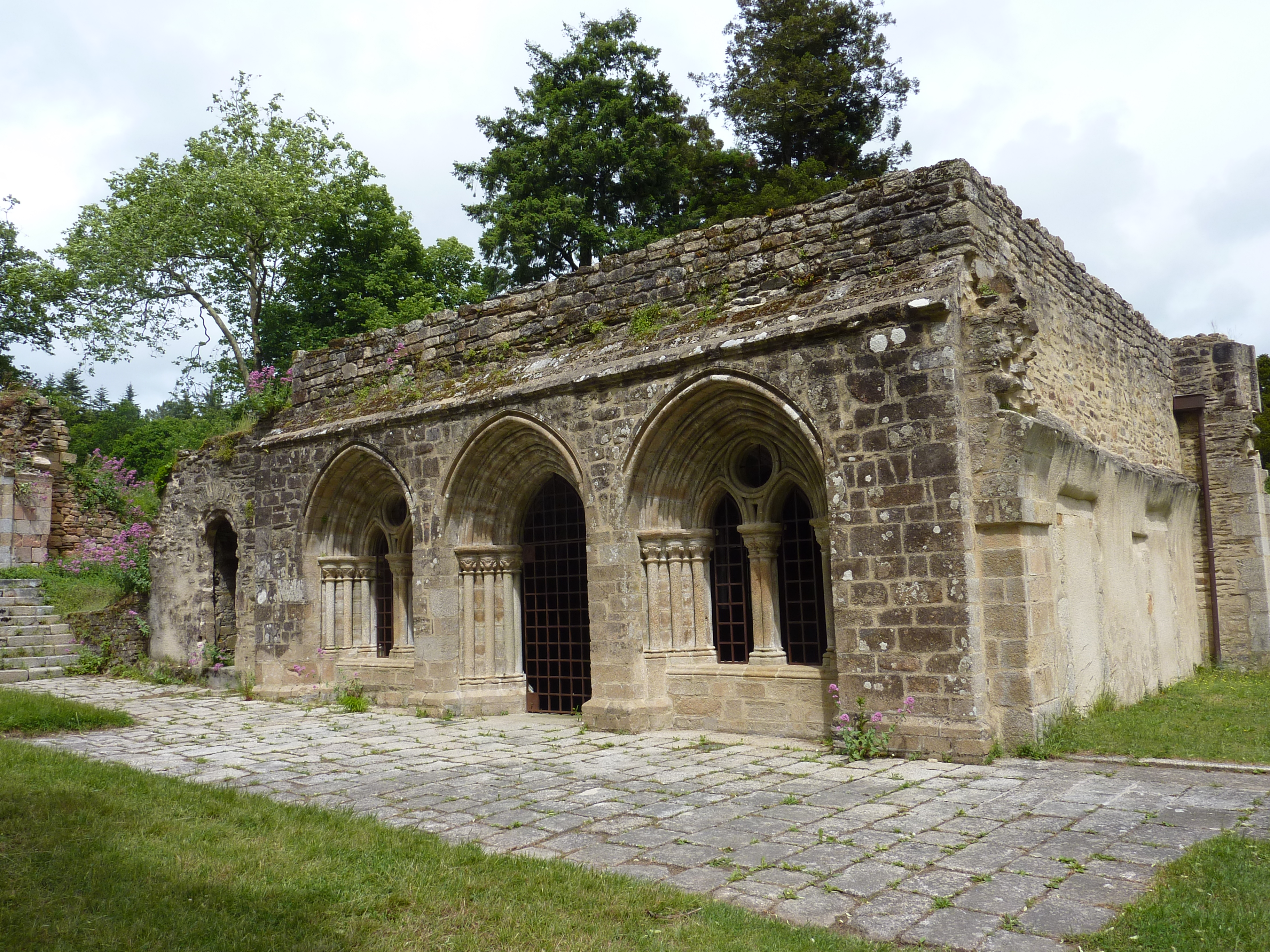 Abbaye Saint-Maurice de Carnoët Vestiges de la salle capitulaire XIIIème siècle